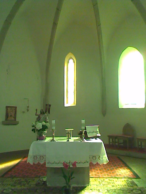 A tiszasülyi Szent László-templom